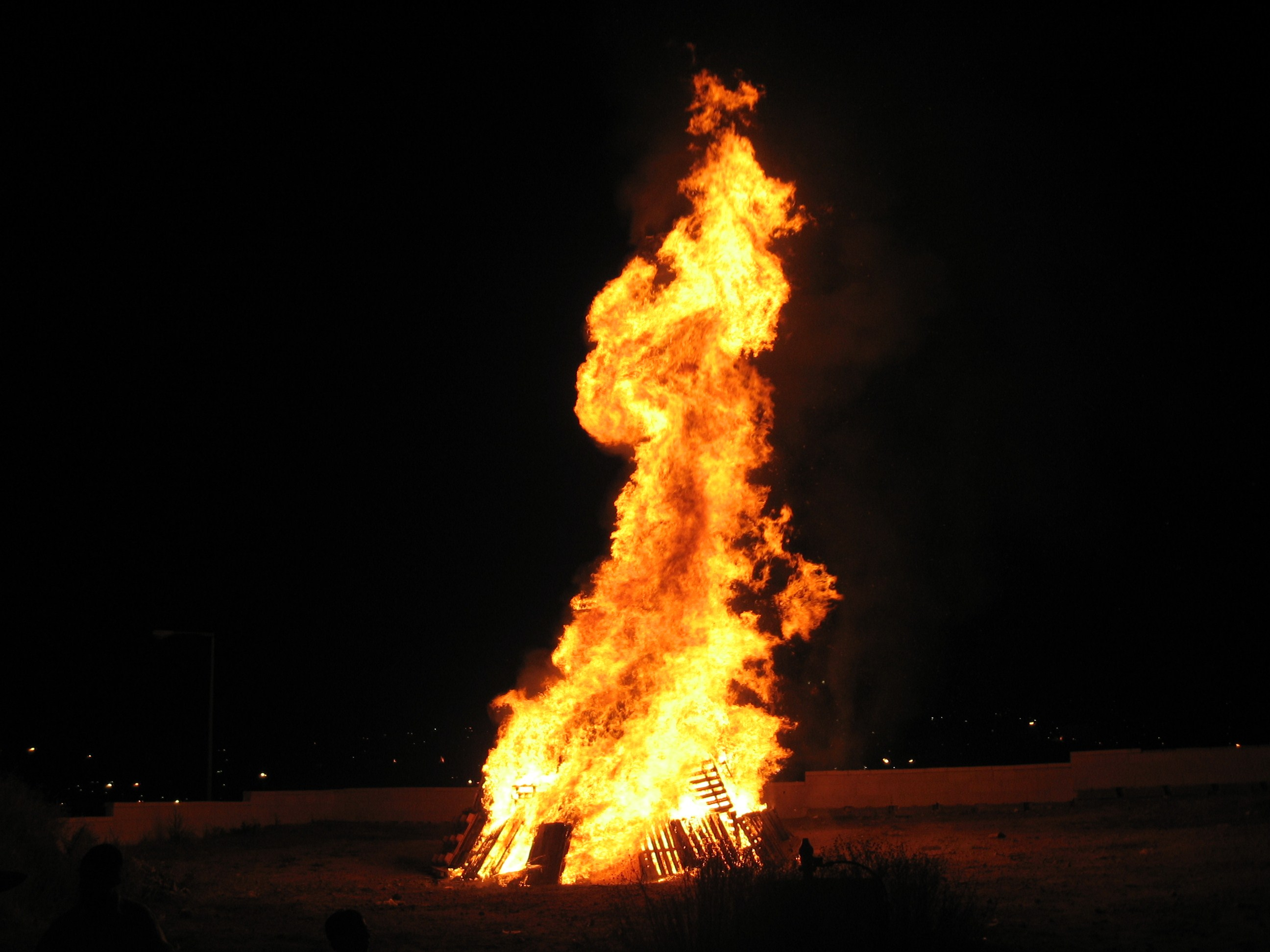 מדורת ל"ג בעומר במודיעין עילית